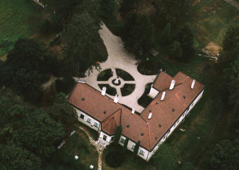 Deák-kúria, Kehidakustány, Hungary, aerial photography This is a photo of a monument in Hungary. Identifier: 10852